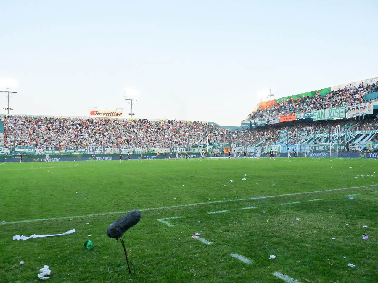 Estadio del Club Atletico Banfield